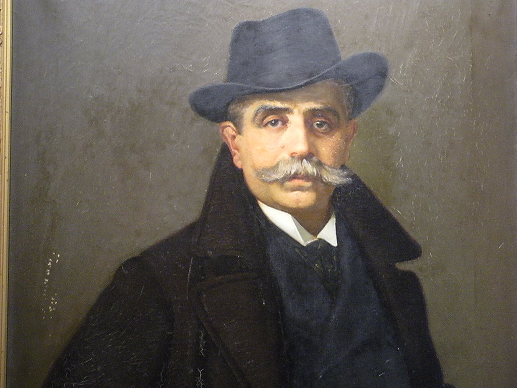 Autoportrait de Teofilo Patini